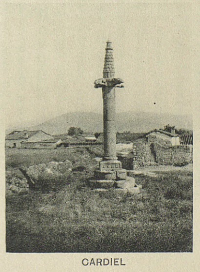 Rollo de Cardiel